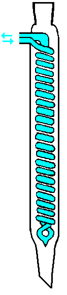 ジムロート冷却器。投稿者本人作成。